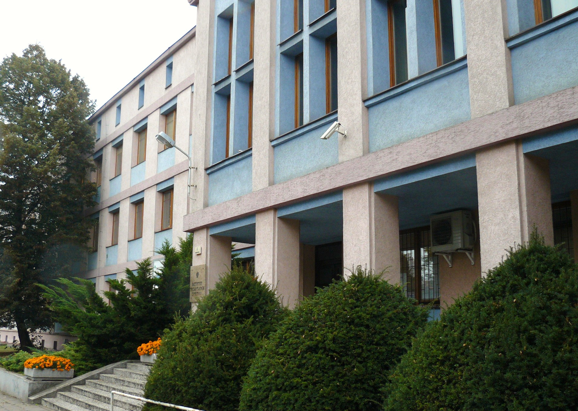 Instytut Technologii Drewna Poznań, Wołyńska Street.